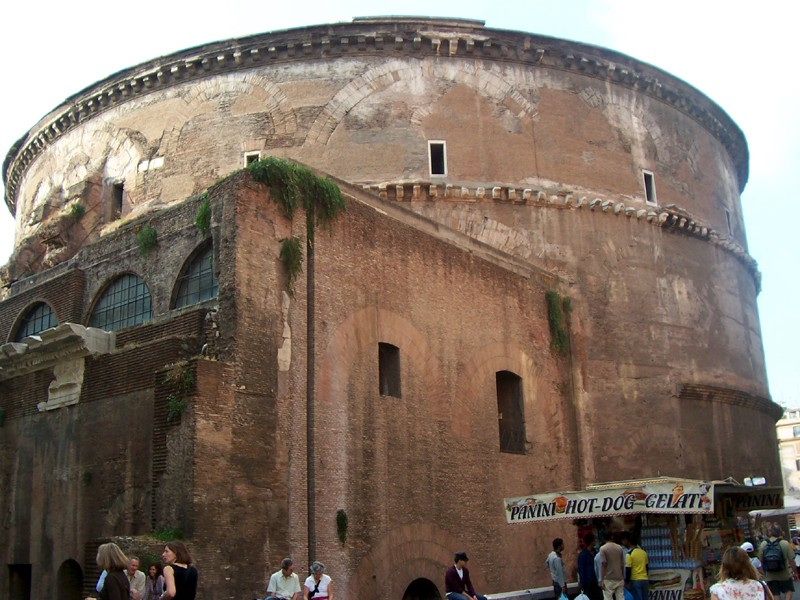 Roma - Pantheon